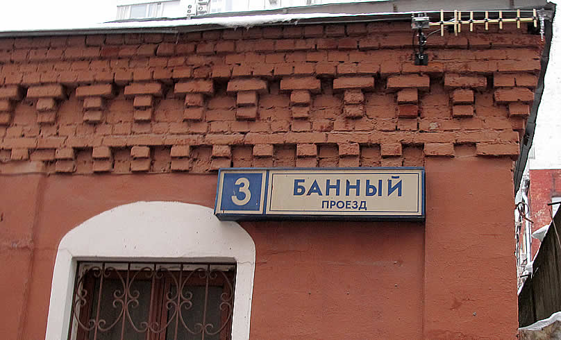 Москва, Банный проезд. Указатель на доме 3.